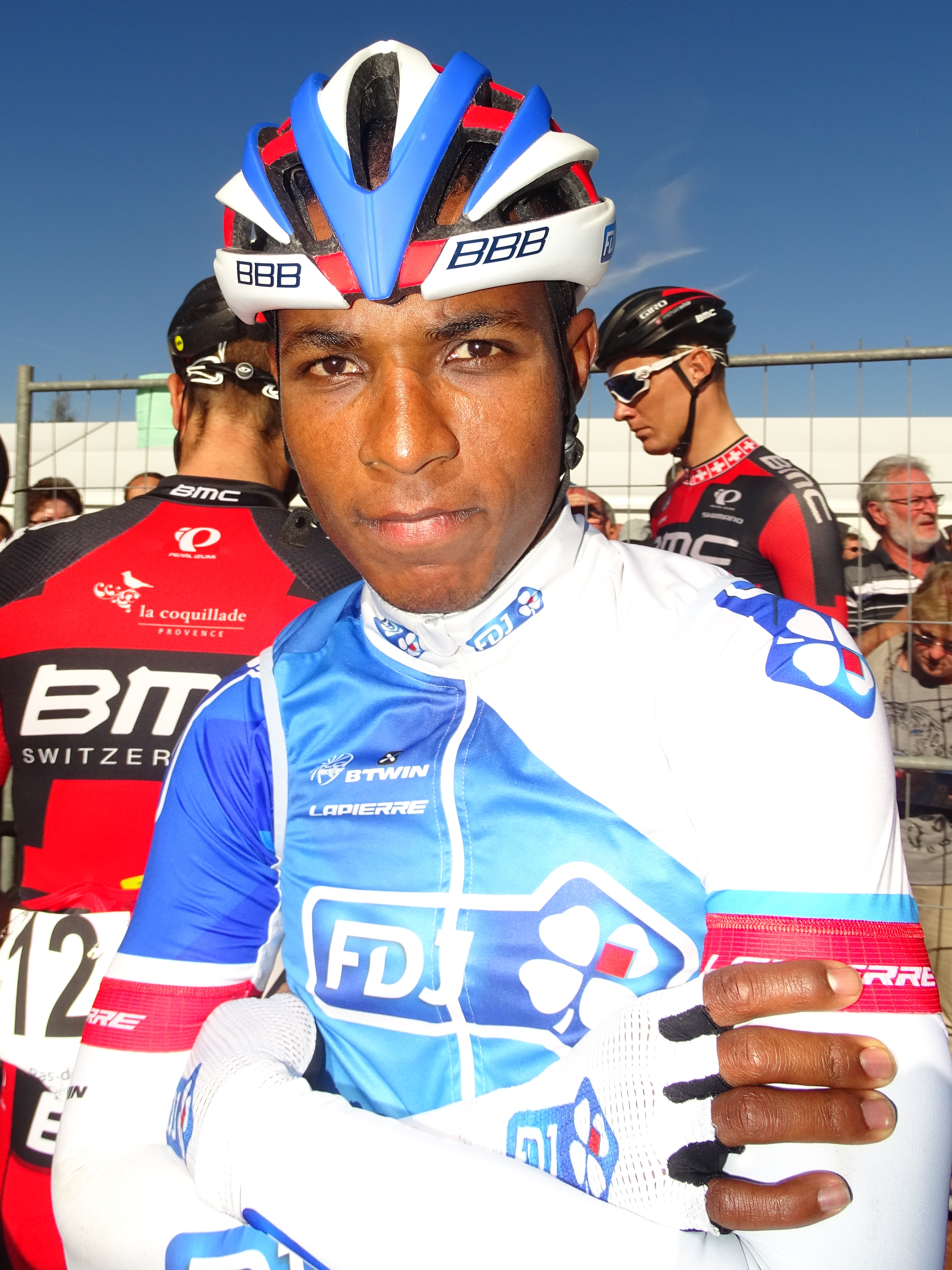 Reportage réalisé le dimanche 20 septembre à l'occasion du départ et de l'arrivée du Grand Prix d'Isbergues 2015 à Isbergues, Nord-Pas-de-Calais, France.